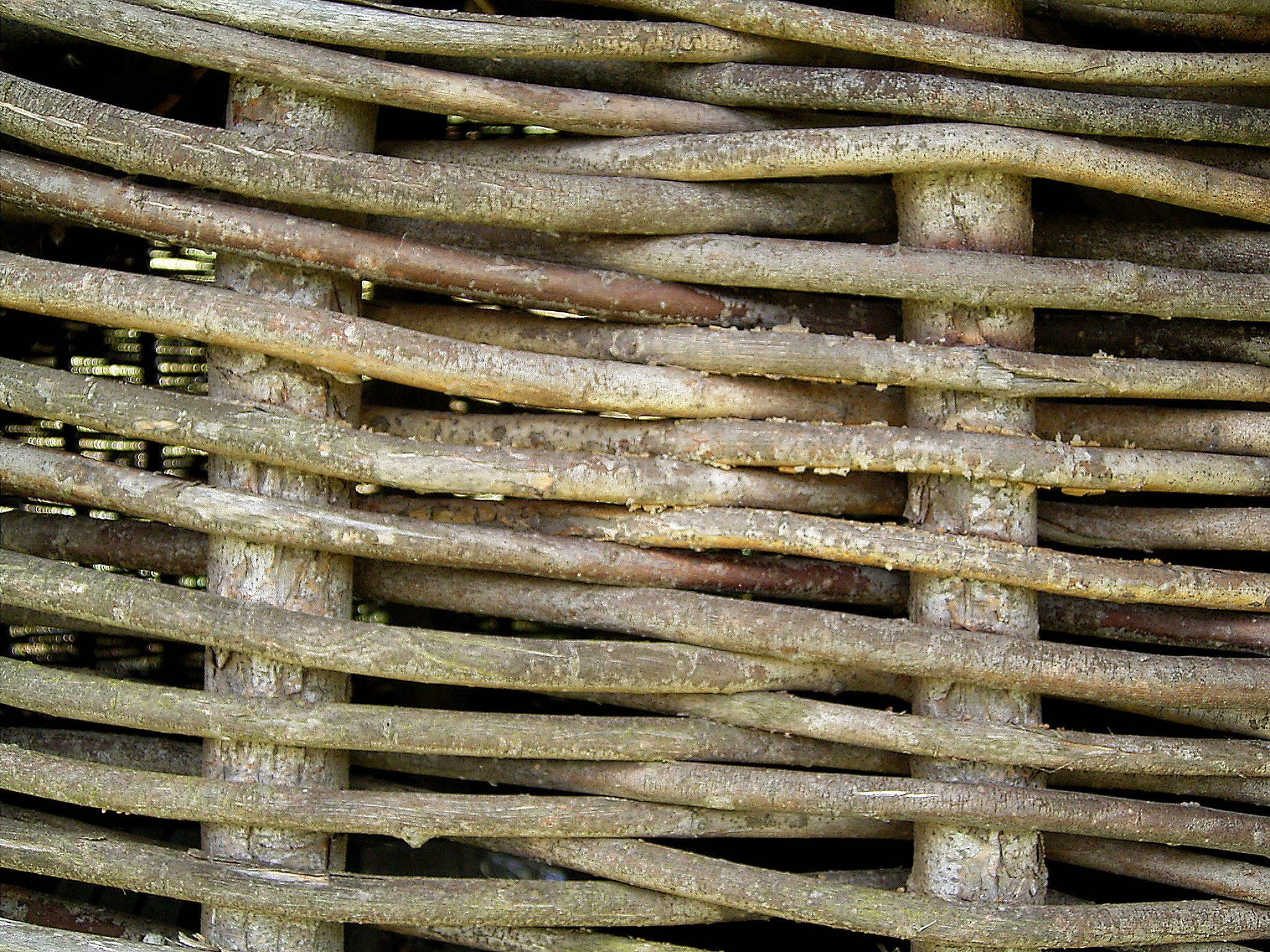 Vikingecenter Fyrkat in Hobro